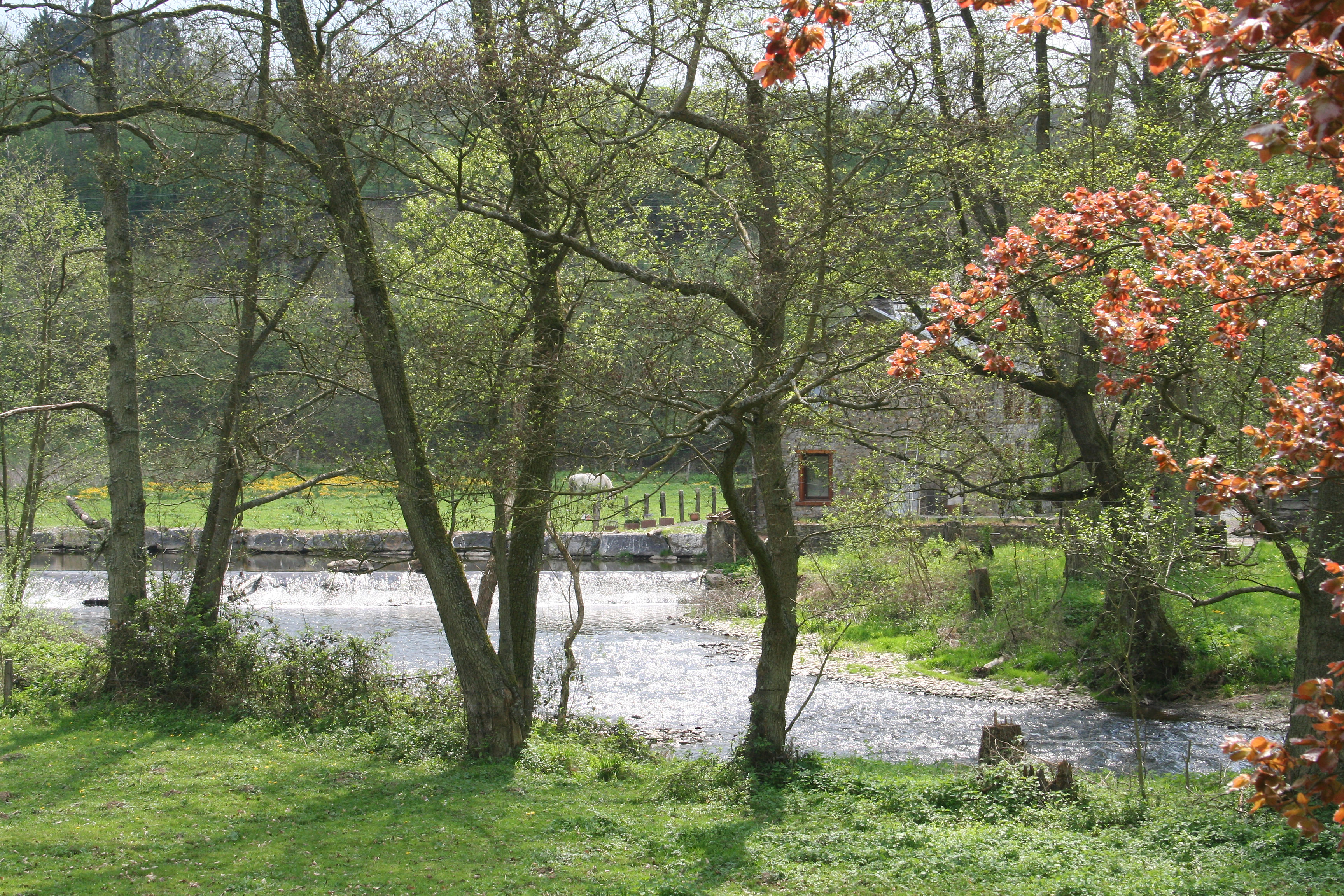 Forrières (Belgique), la L'Homme à hauteur du bief de l'ancien moulin de la saboterie.